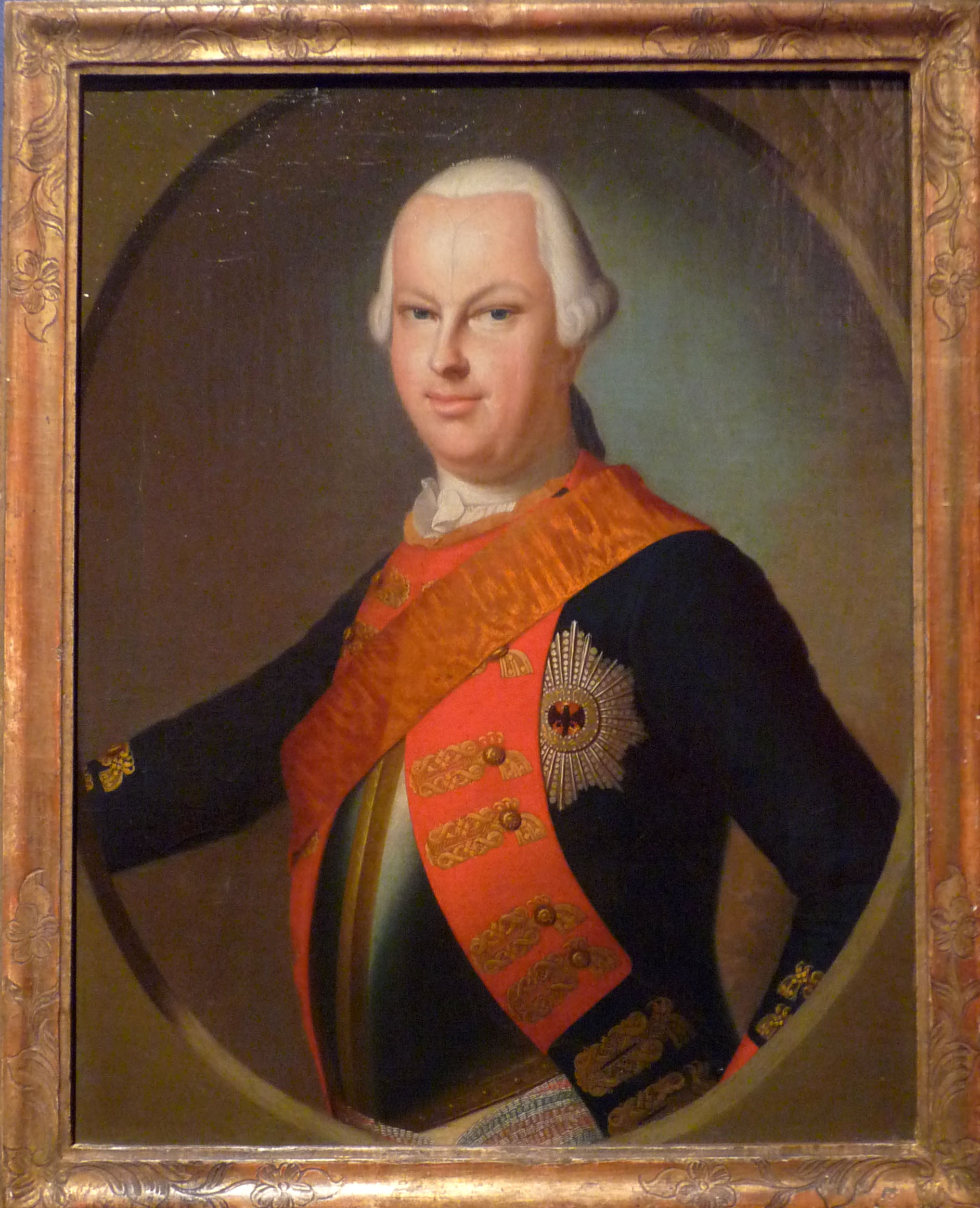 Louis IX de Hesse-Darmstadt (1719-1790), huile sur toile, vers 1780, Musée historique de Strasbourg